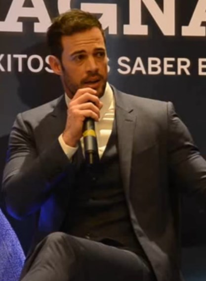 William Levy en Guatemala en abril de 2015 promocionando su nueva fragancia